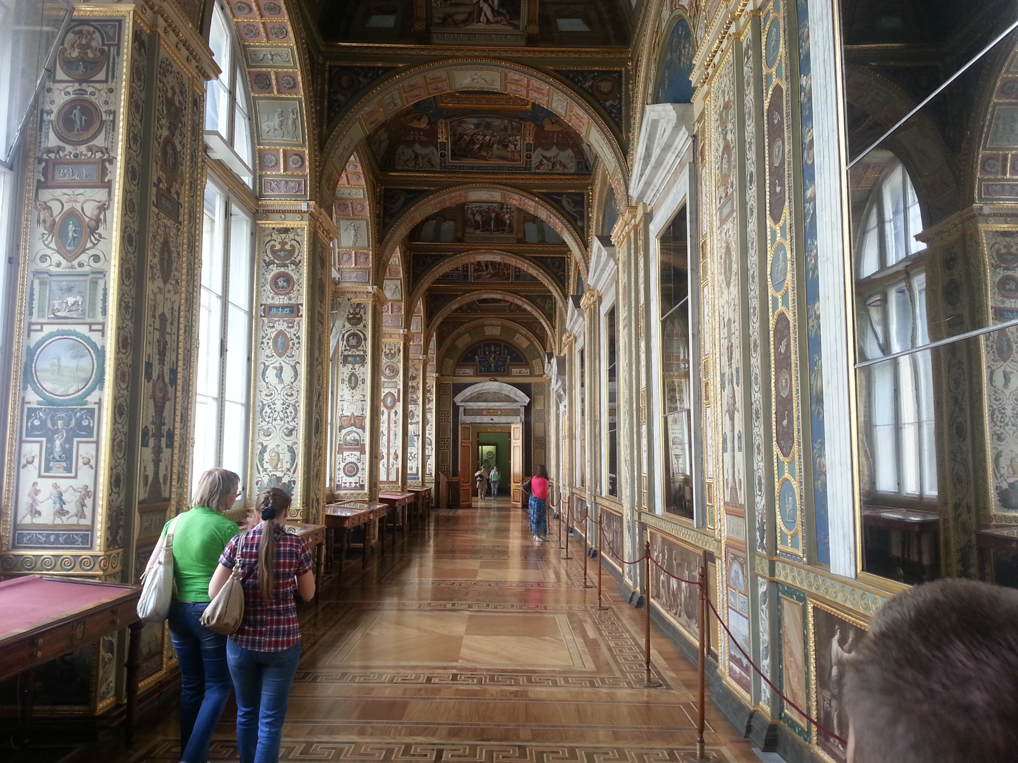 Ermitaj Müzesi iç görünümü.